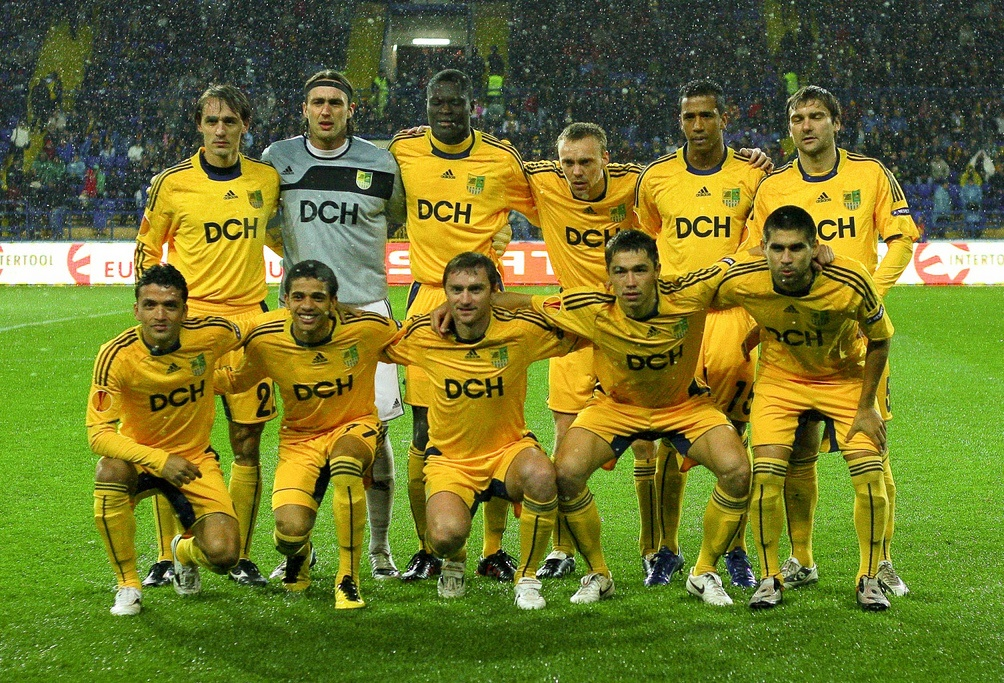 30/09/2010, Лига Европы, Металлист-ПСВ Эйндховен